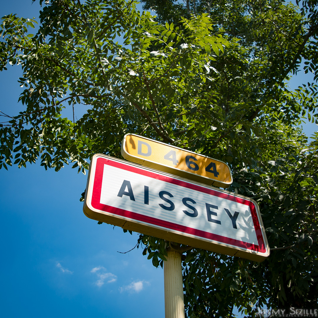 Panneau entré de ville Aïssey